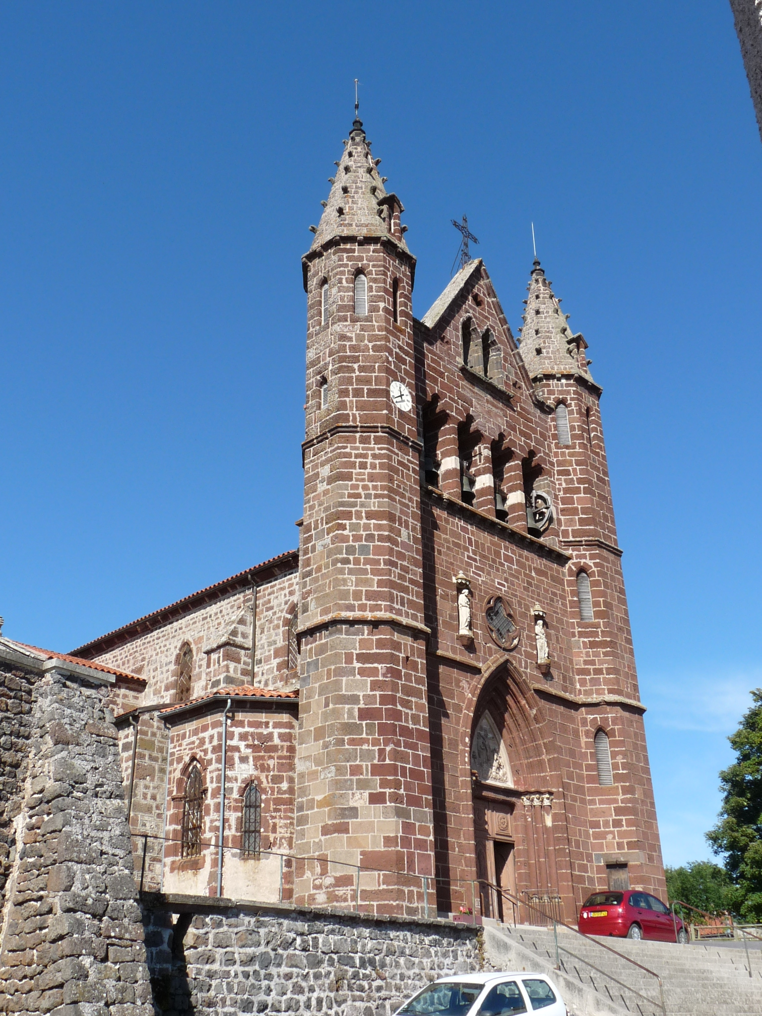 Kirche Saint-Pierre in Cayres, Frankreich, Département Haute-Loire